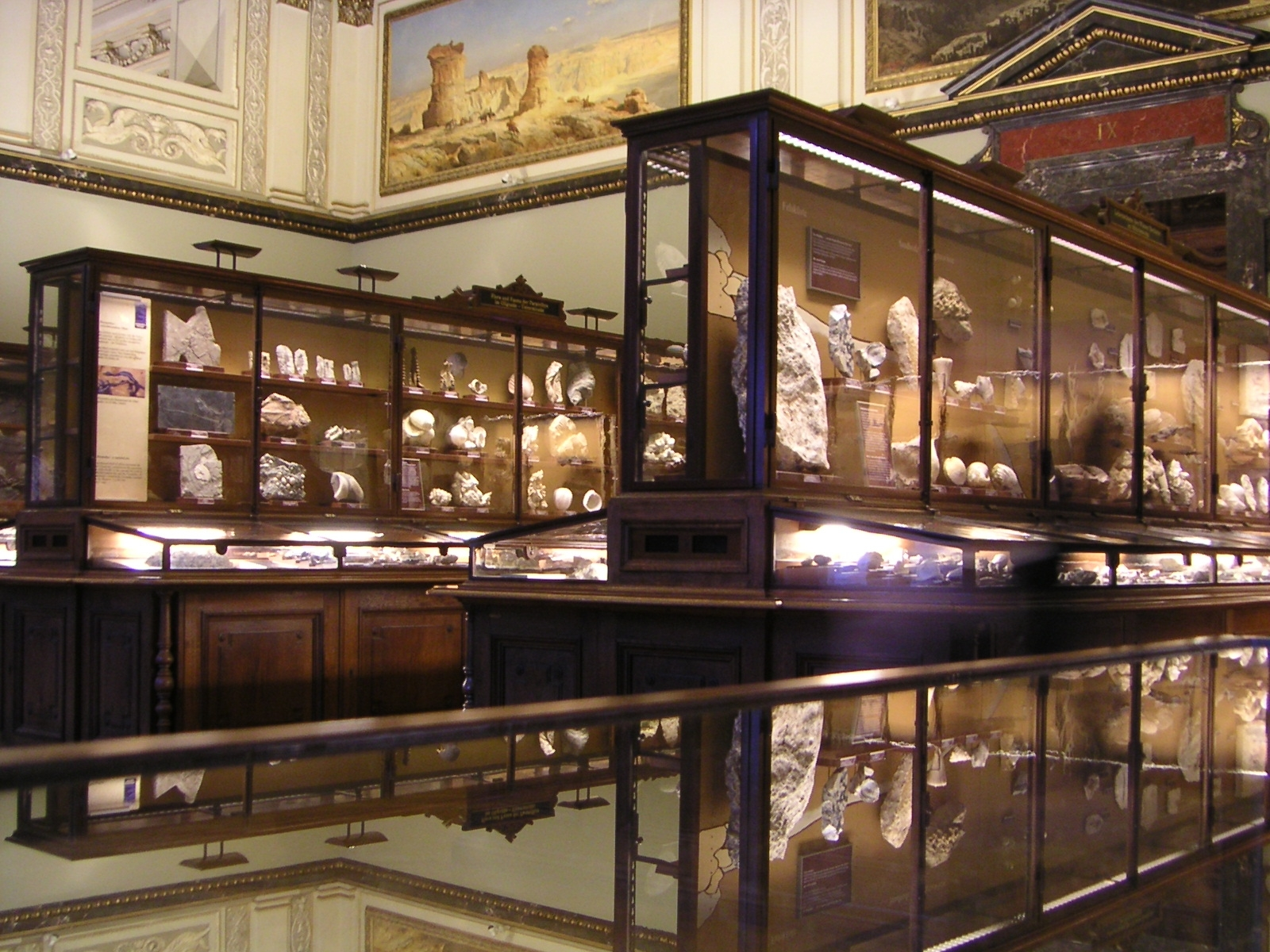 Summary Schauraum im Naturhistorischen Museum in Wien, selbst fotografiert